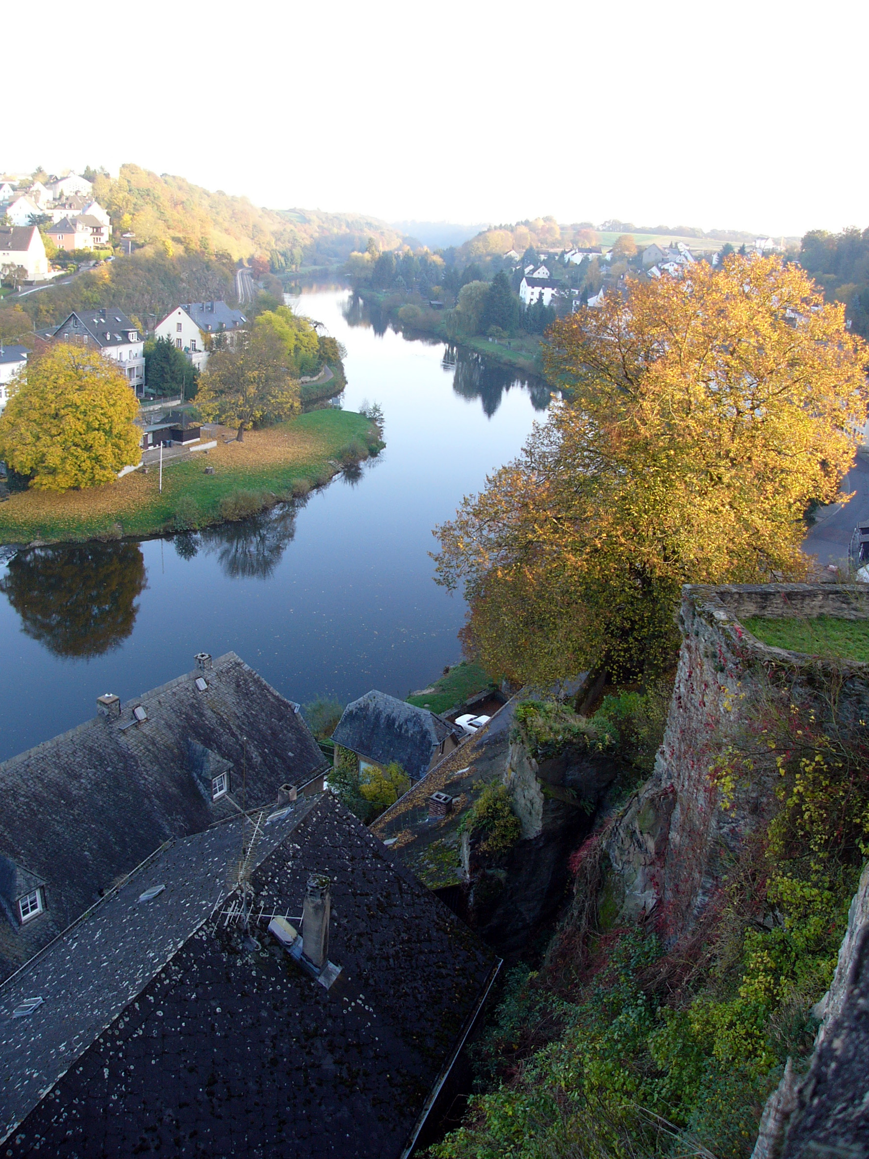 Runkel and river Lahn.